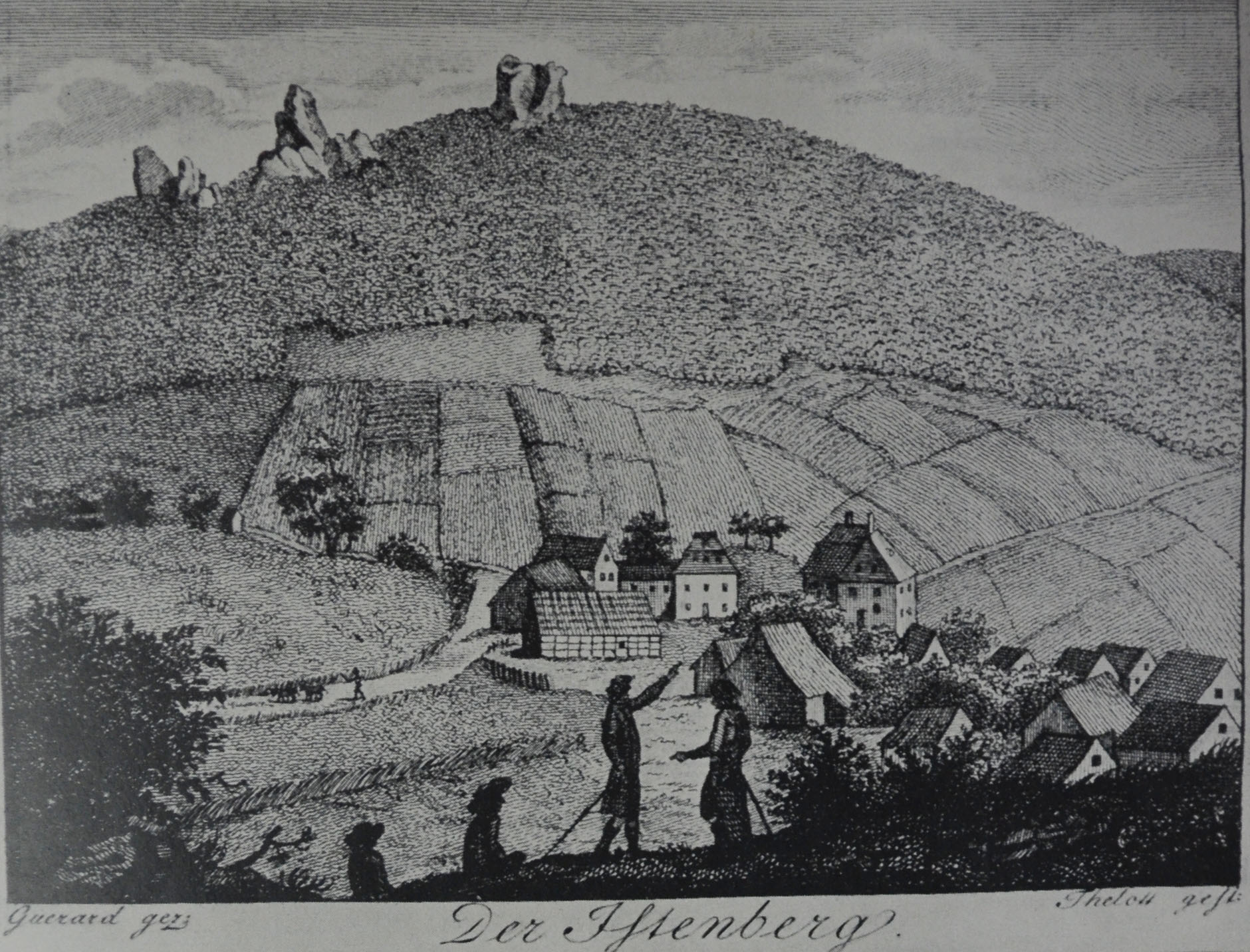 Alteste bekannt Ansicht der Bruchhauser Steine, Kupferstich von 1791